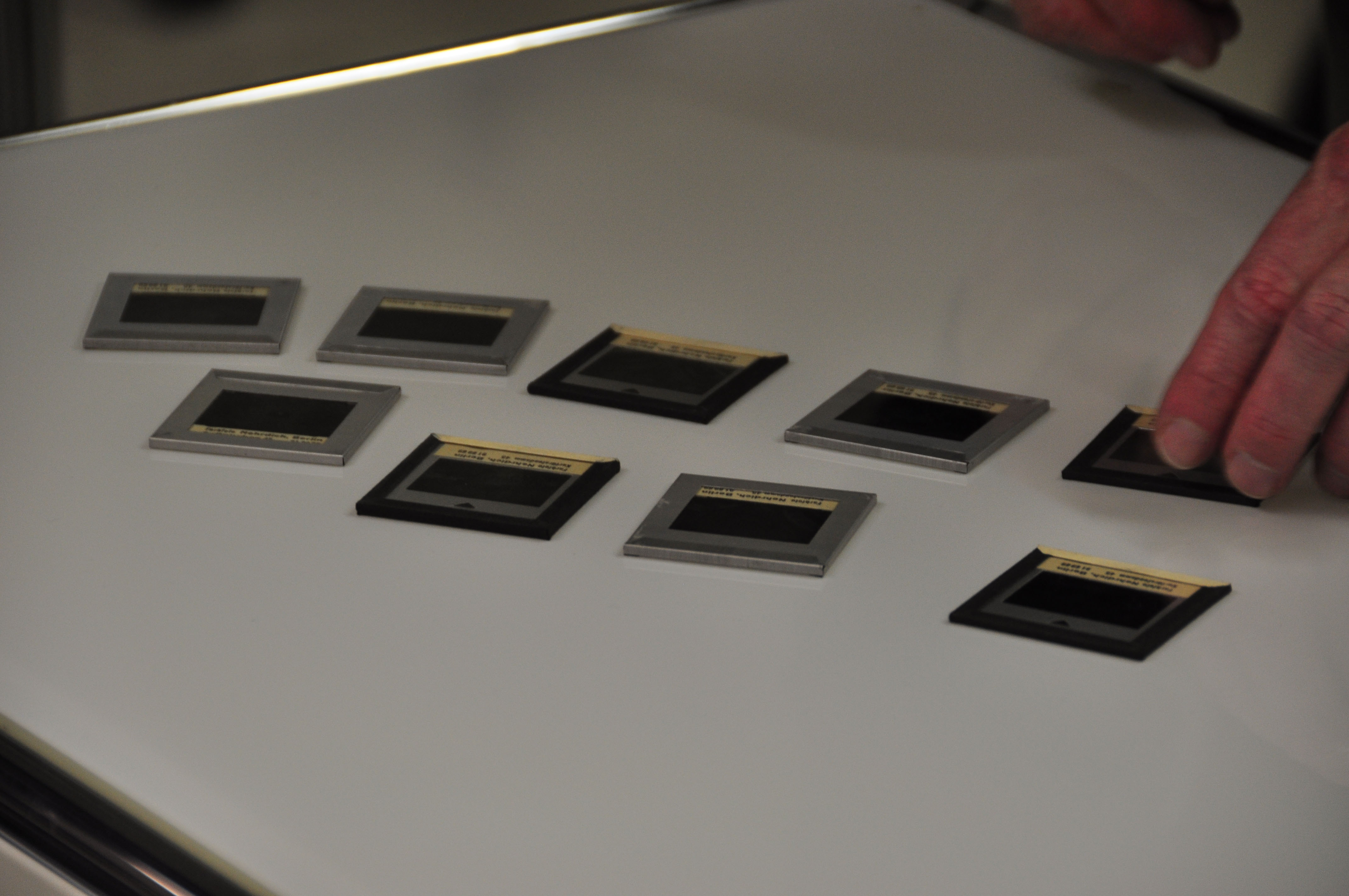 Originaldias des Farbarchivs